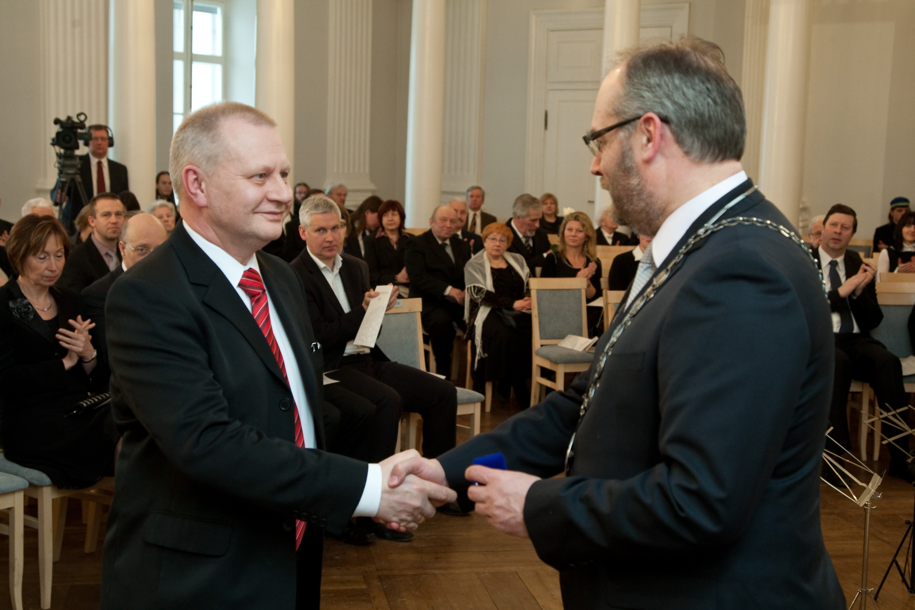 Eesti Vabariigi 92. aastapäevale pühendatud kontsertaktus 23. veebruaril 2010 Tartu Ülikooli aulas. Tartu Ülikooli aumärkide üleandmine. Pildil TÜ loodus- ja tehnoloogiateaduskonna kondensaine teooria professor Teet Örd (vasakul) ja TÜ rektor professor Alar Karis.